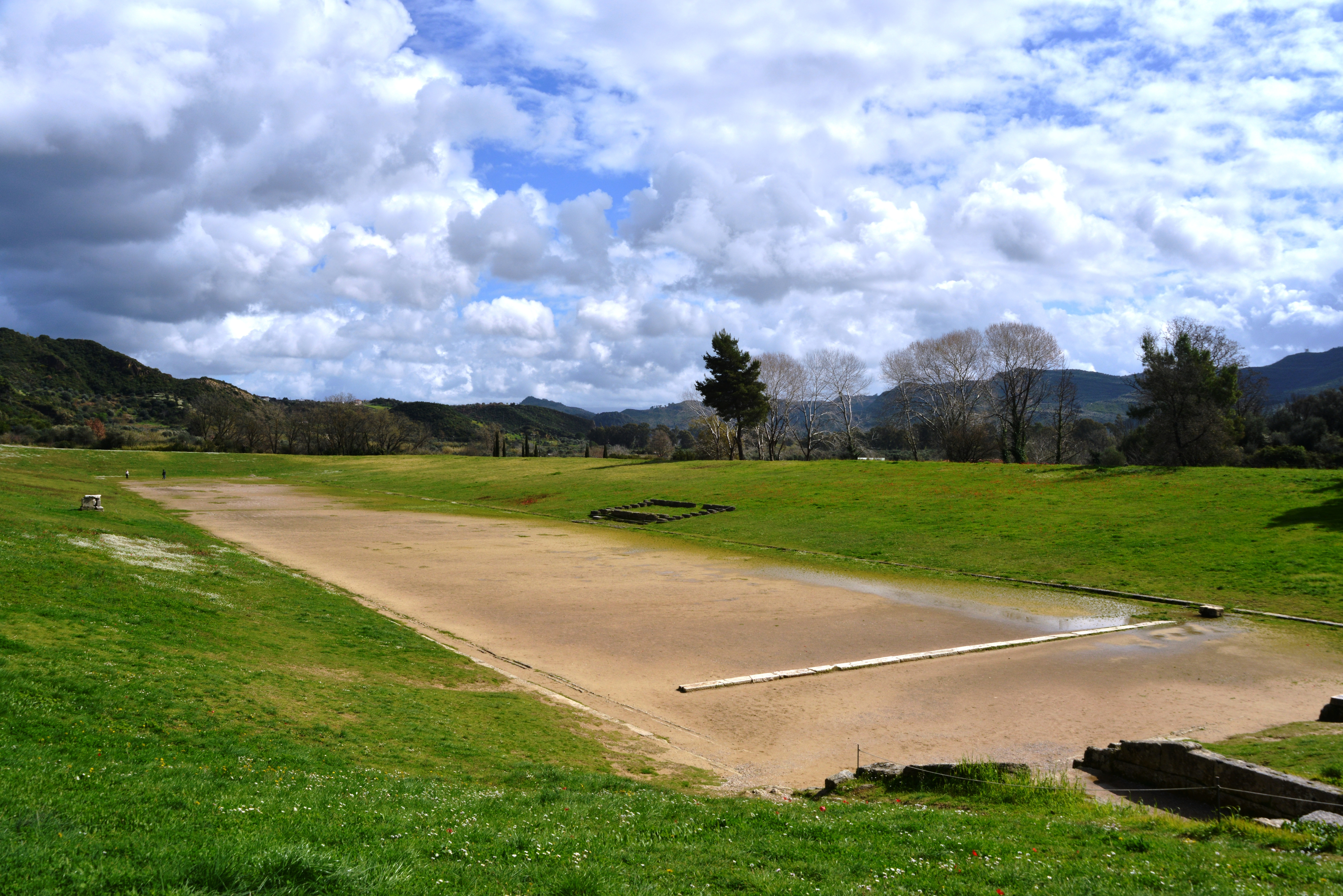 Αρχαίο στάδιο Ολυμπίας«Στάδιο αρχαίας Ολυμπίας»